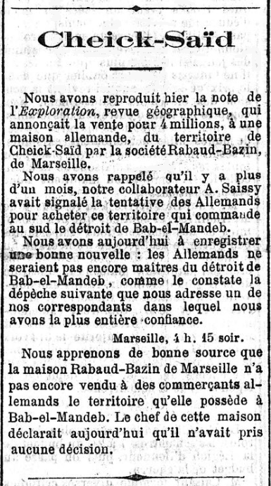 Entrefilet dans L'Écho de Paris du 13 décembre 1884 concernant les rumeurs de vente de Cheikh Saïd à des commerçants allemands.